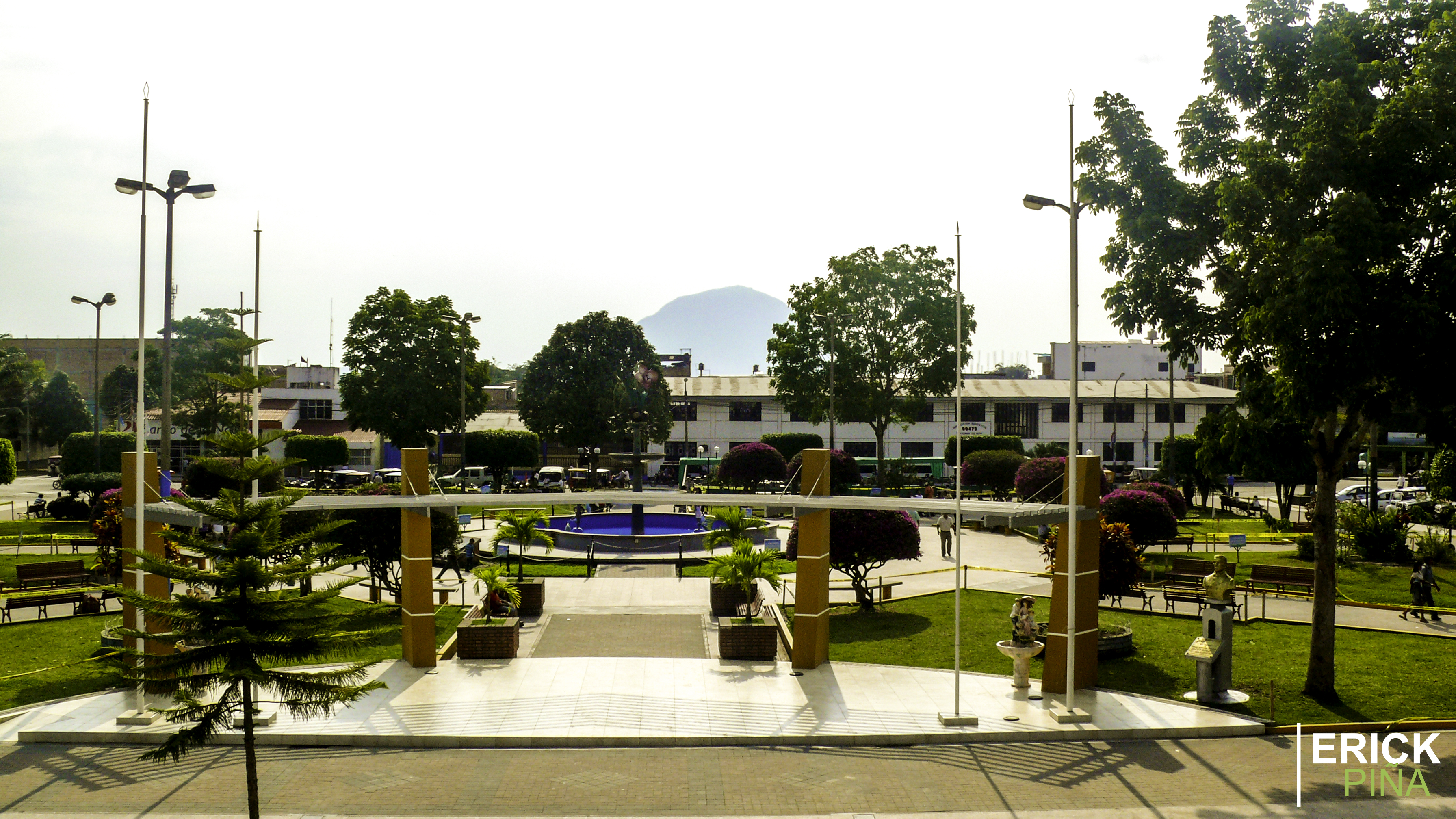 Foto de la plaza de Armas de Moyobamba de día